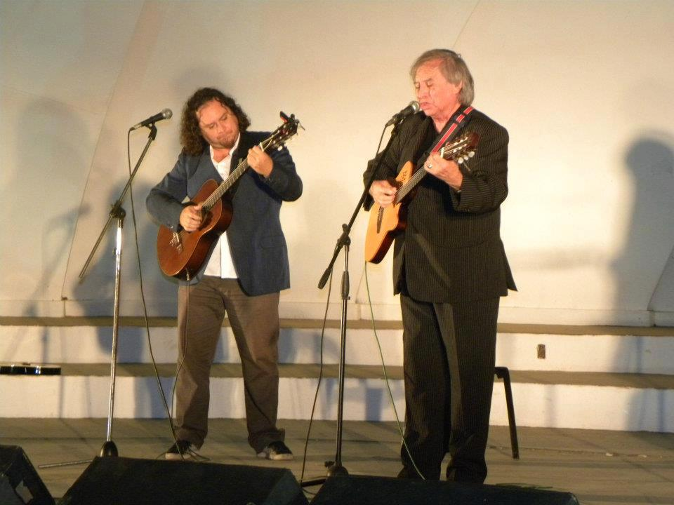 Coco en un show con su hijo Juan Martin